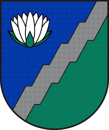 Brocēnu novada ģerbonis